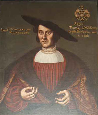 Porträt des Lübecker Bürgermeisters Thomas von Wickede (1472-1527)